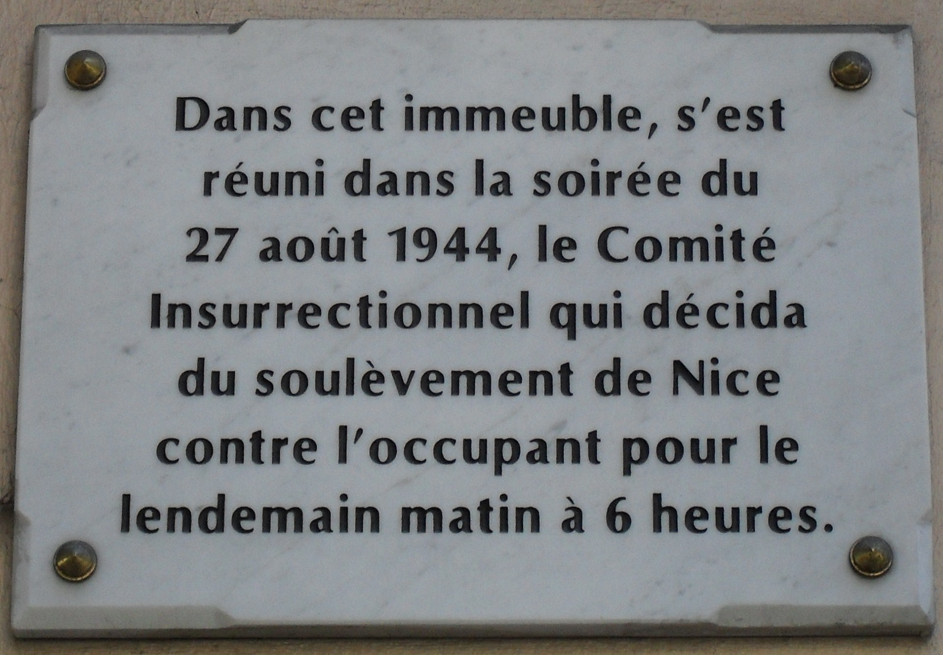 plaque commémorative pour le Comité Insurrectionnel de Nice du 37 août 1944 situé 20 bd Cessole palais stella